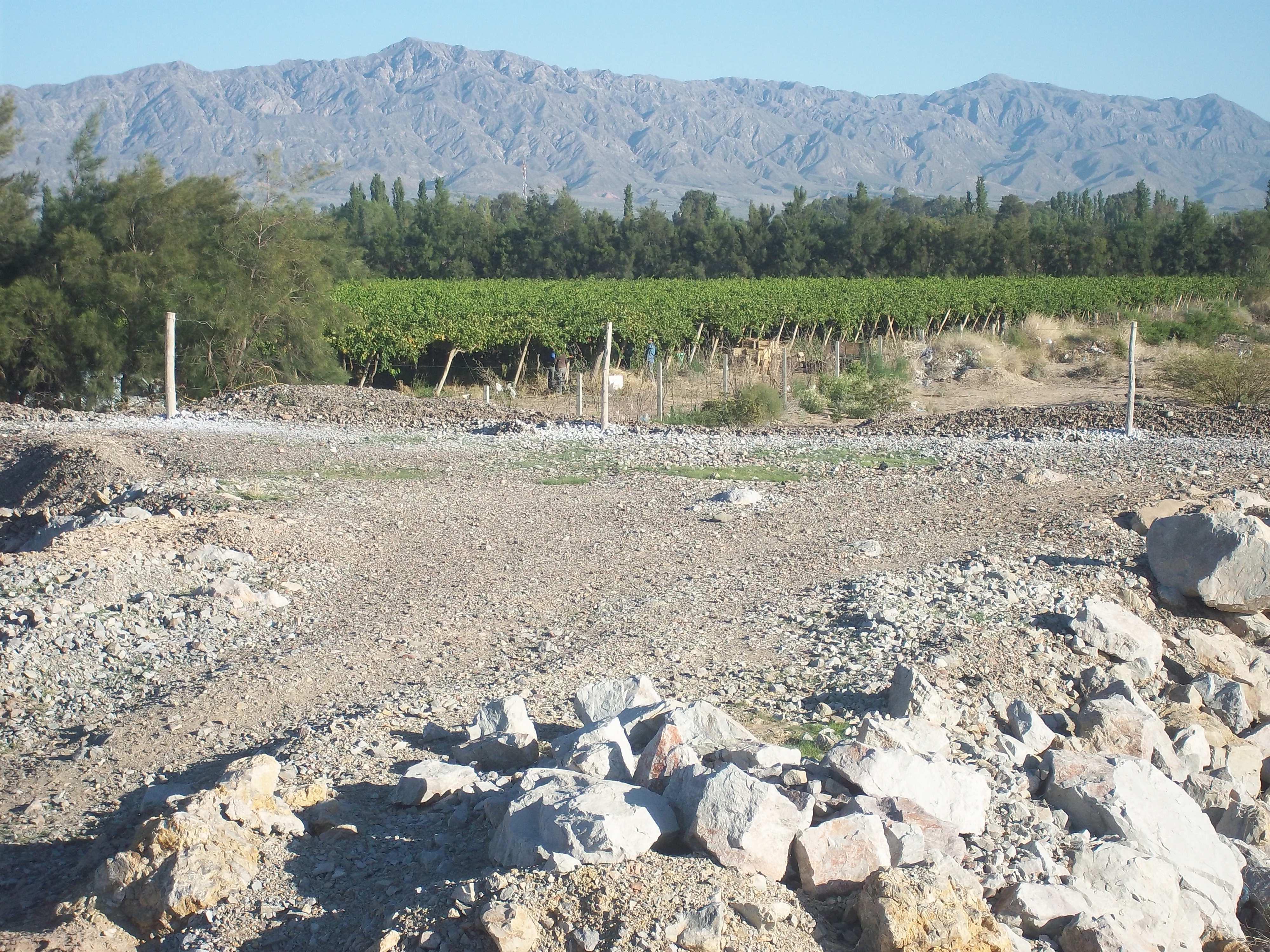 Viñedos y serranías del Villicum en el departamento Albardón en la provincia de San Juan, Argentina.